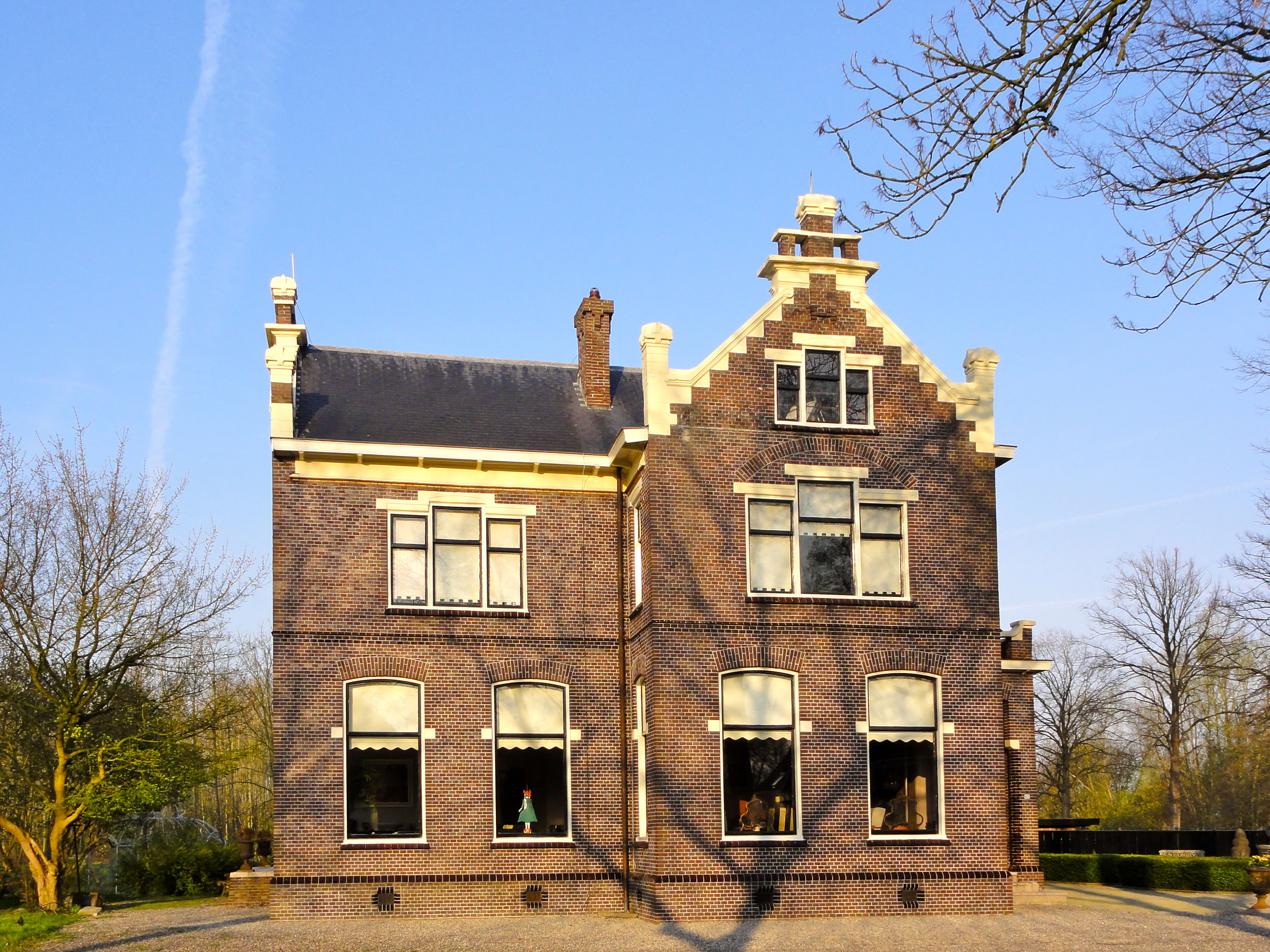 Burgemeesterswoning Hoofdstraat 63 't Zandt